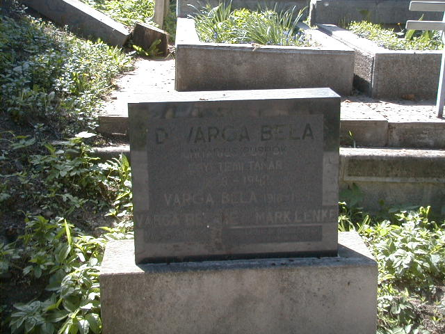 Varga Béla (Torda, 1886. október 23. - Kolozsvár, 1942. április 10.) pedagógus, unitárius püspök, teológiai író, egyetemi tanár (az MTA l. tagja-1940) sírja Kolozsvárott, a Házsongárdi temetőben. 369